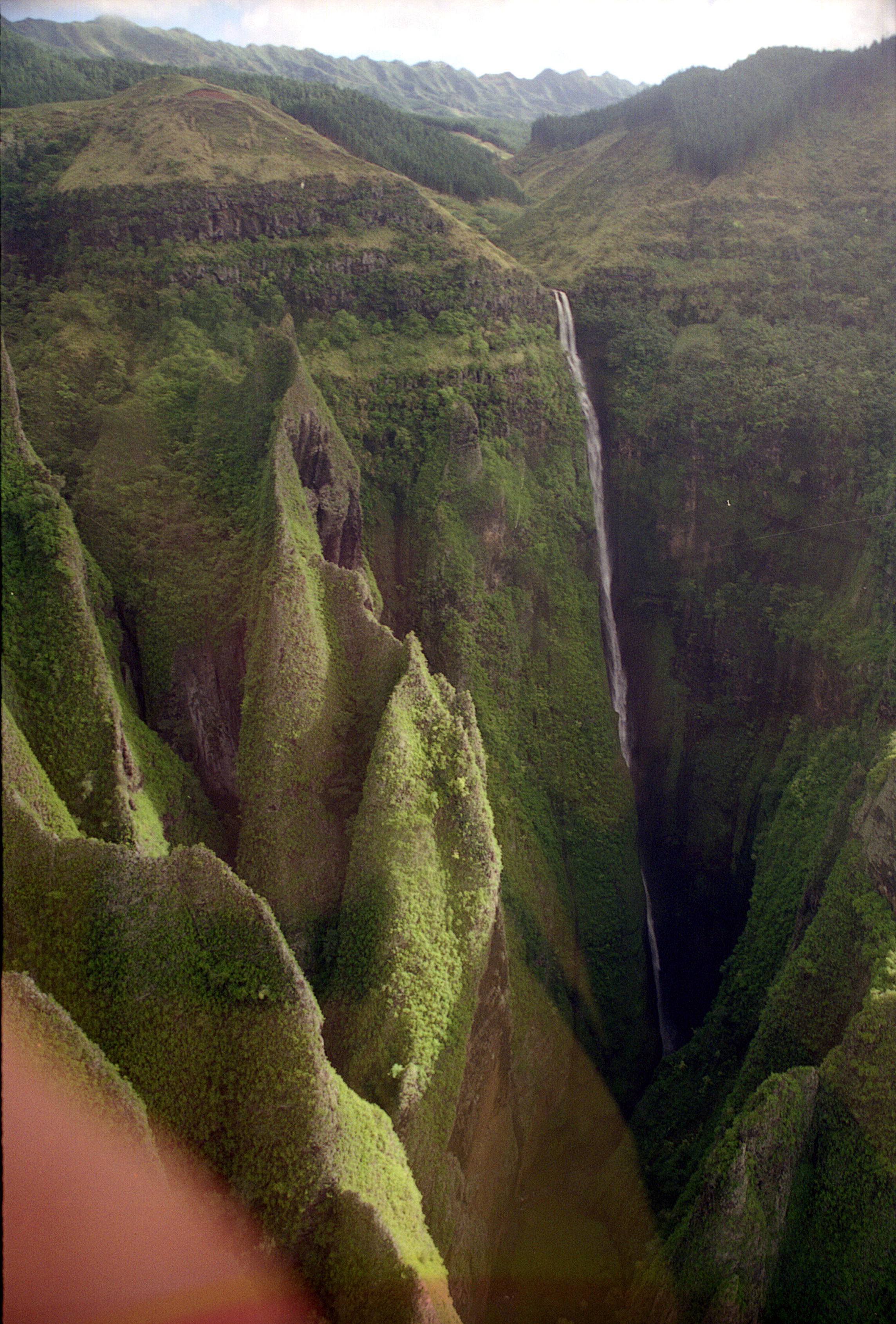 polynésie, iles marquises, Nuku Iva